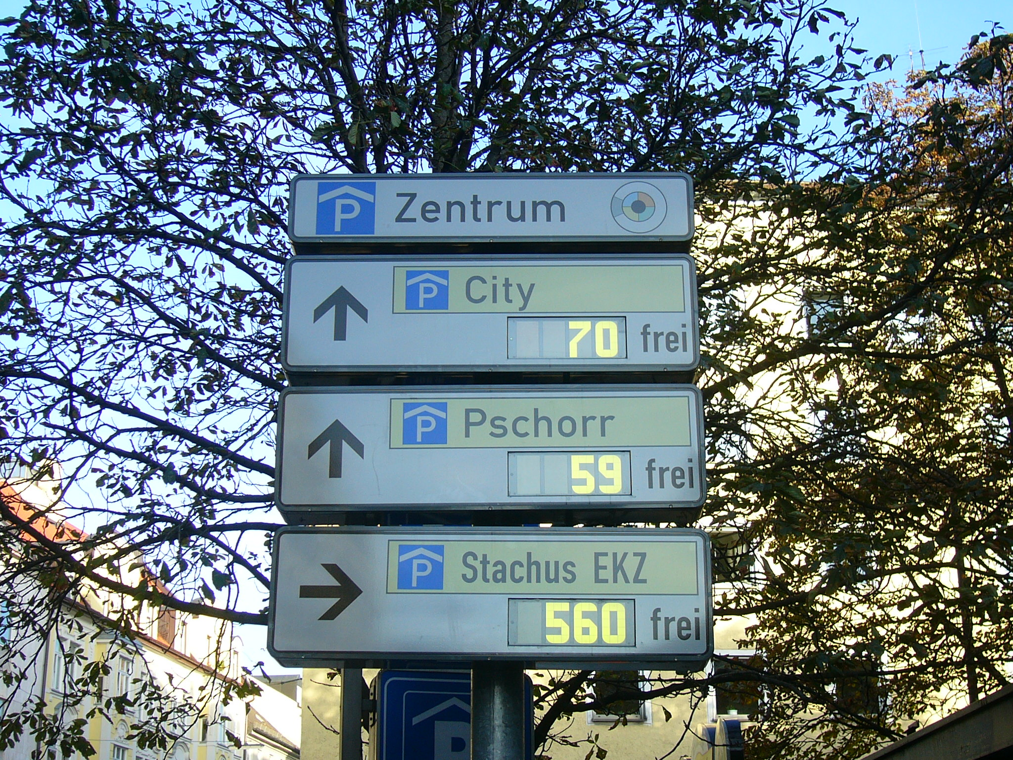 Munich Parkleitsystem Altstadt (Herzog-Wilhelm-Str.)